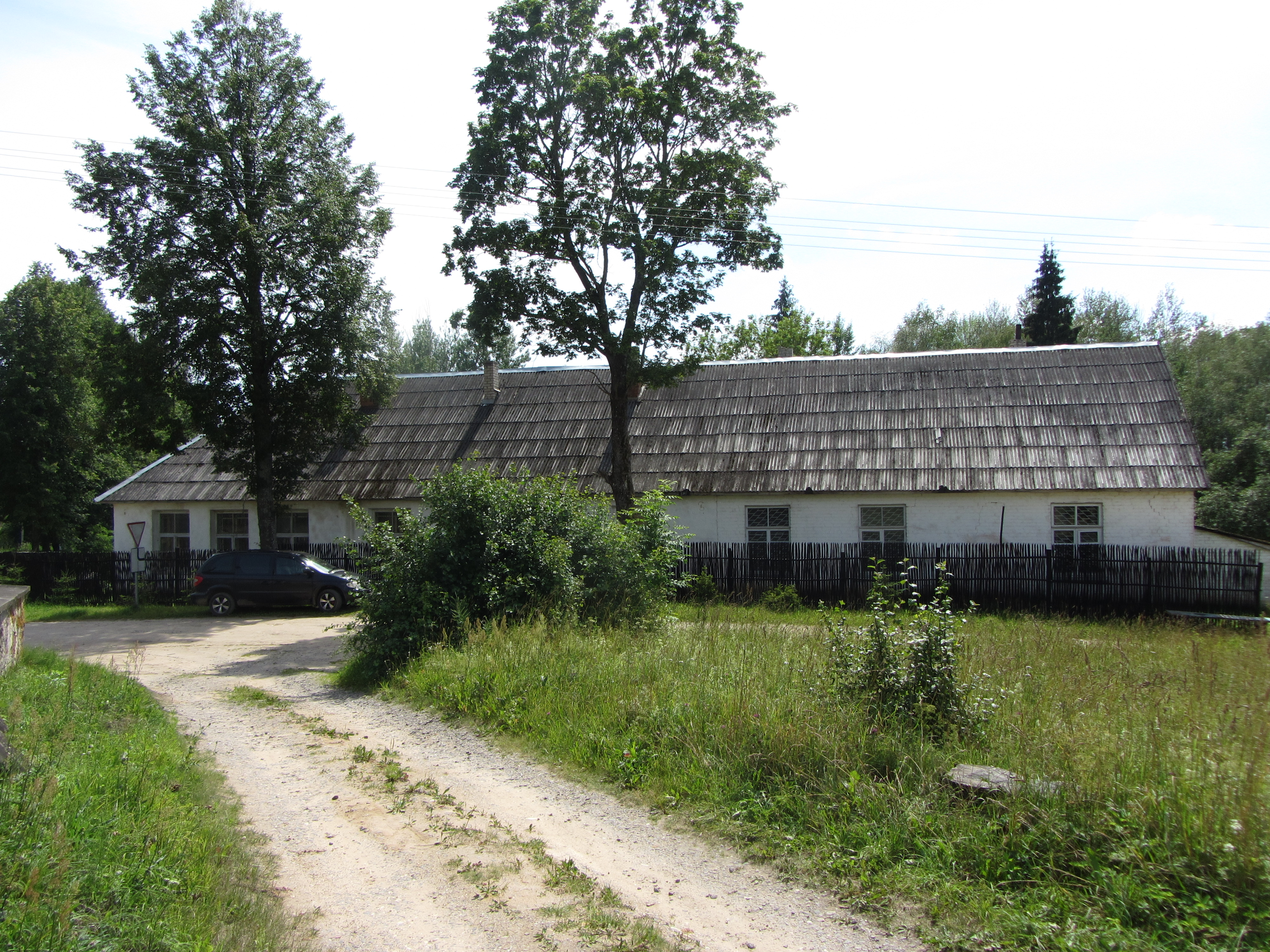 Gaidė, Lithuania